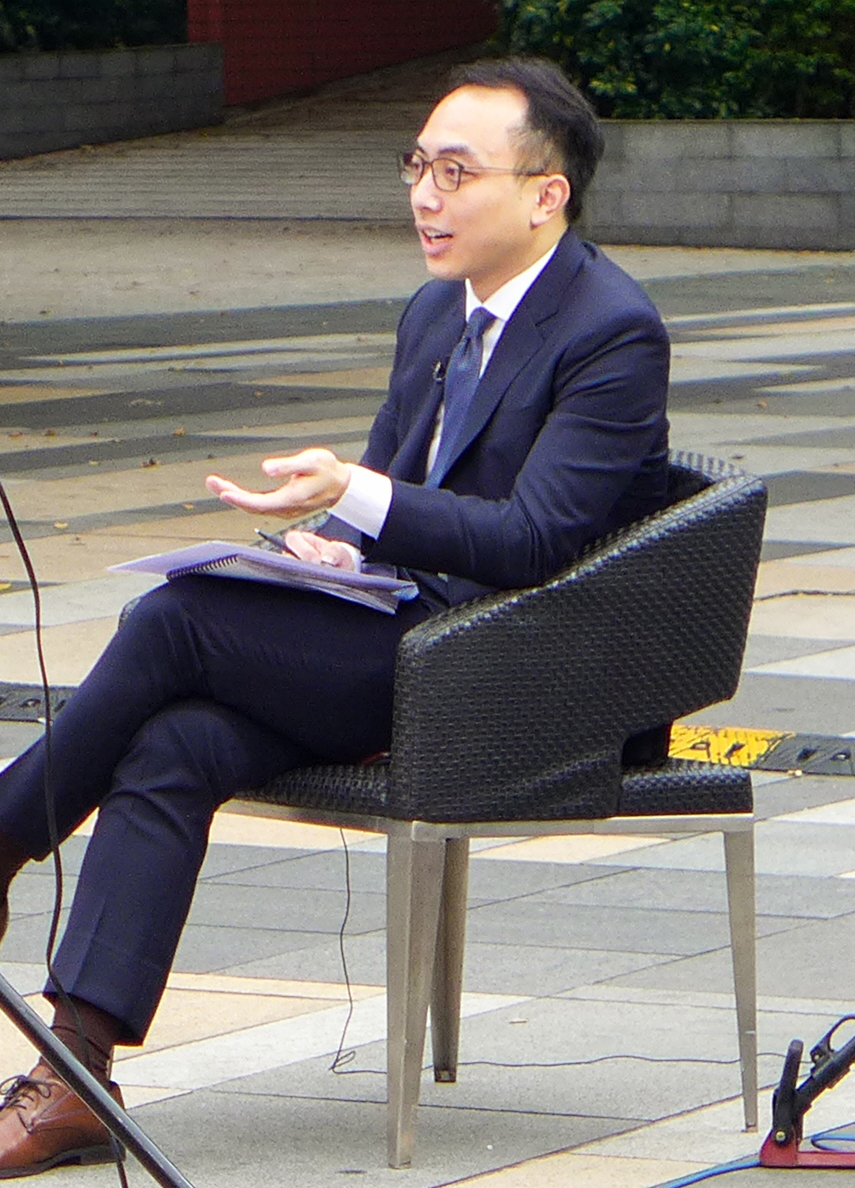 Kenneth Ng King Chun